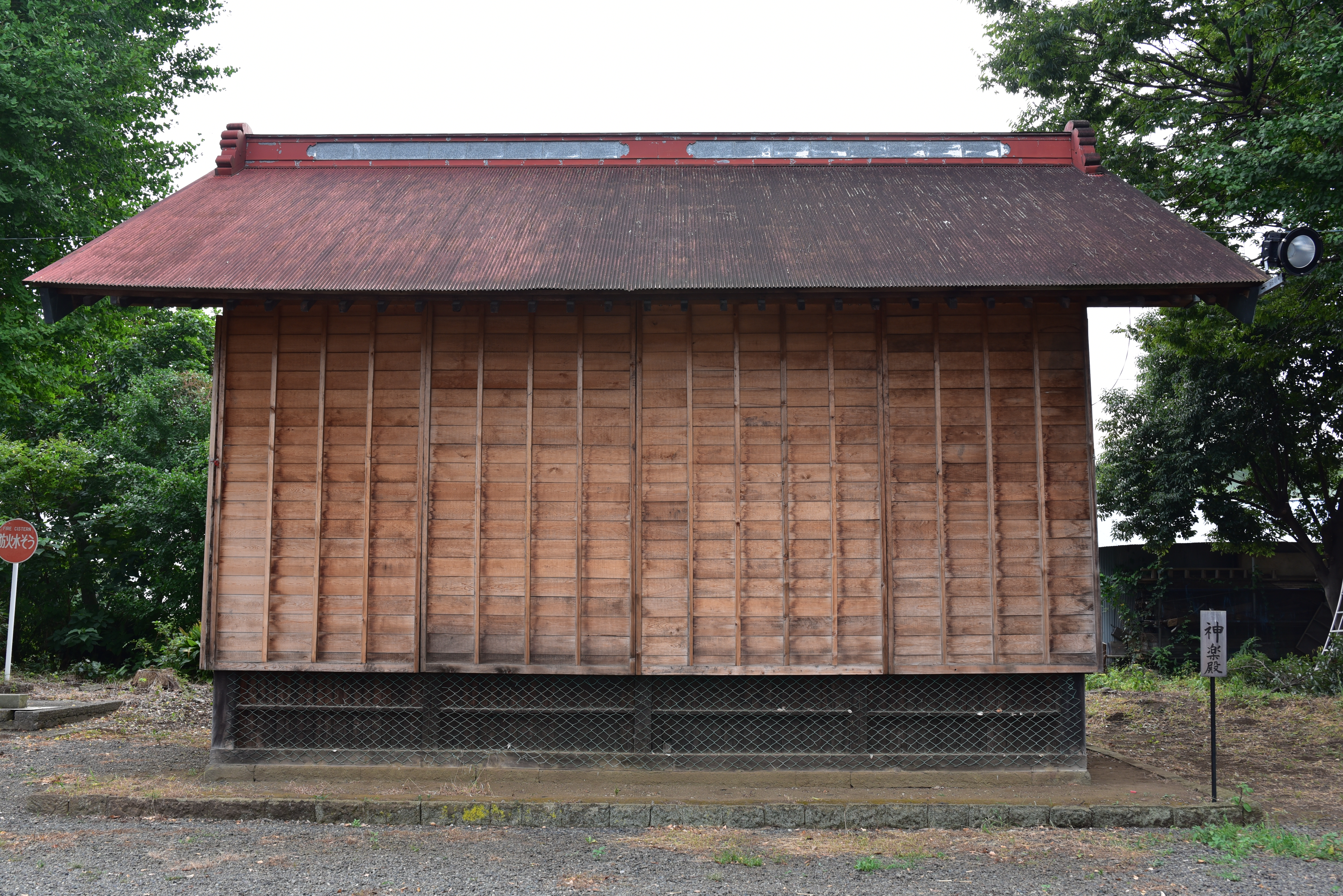 高部屋神社の神楽殿（神奈川県伊勢原市）